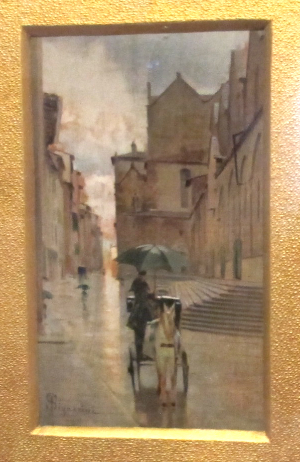 Museo Nazionale d'Arte Medievale e Moderna - MIBAC This is a photo of a monument which is part of cultural heritage of Italy.